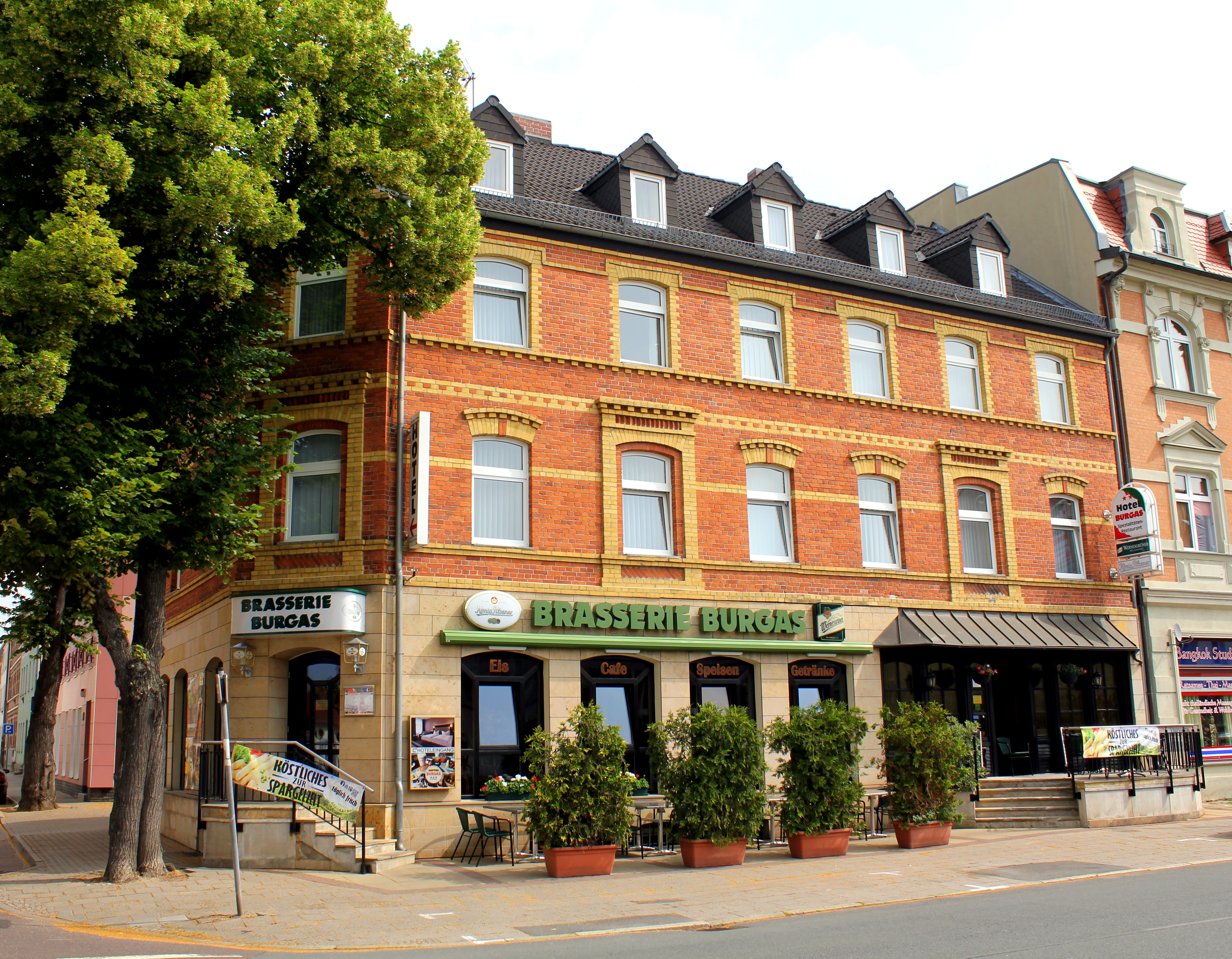 Wohnhaus, Hohenerxlebener Straße 100, Staßfurt-Leopoldshall